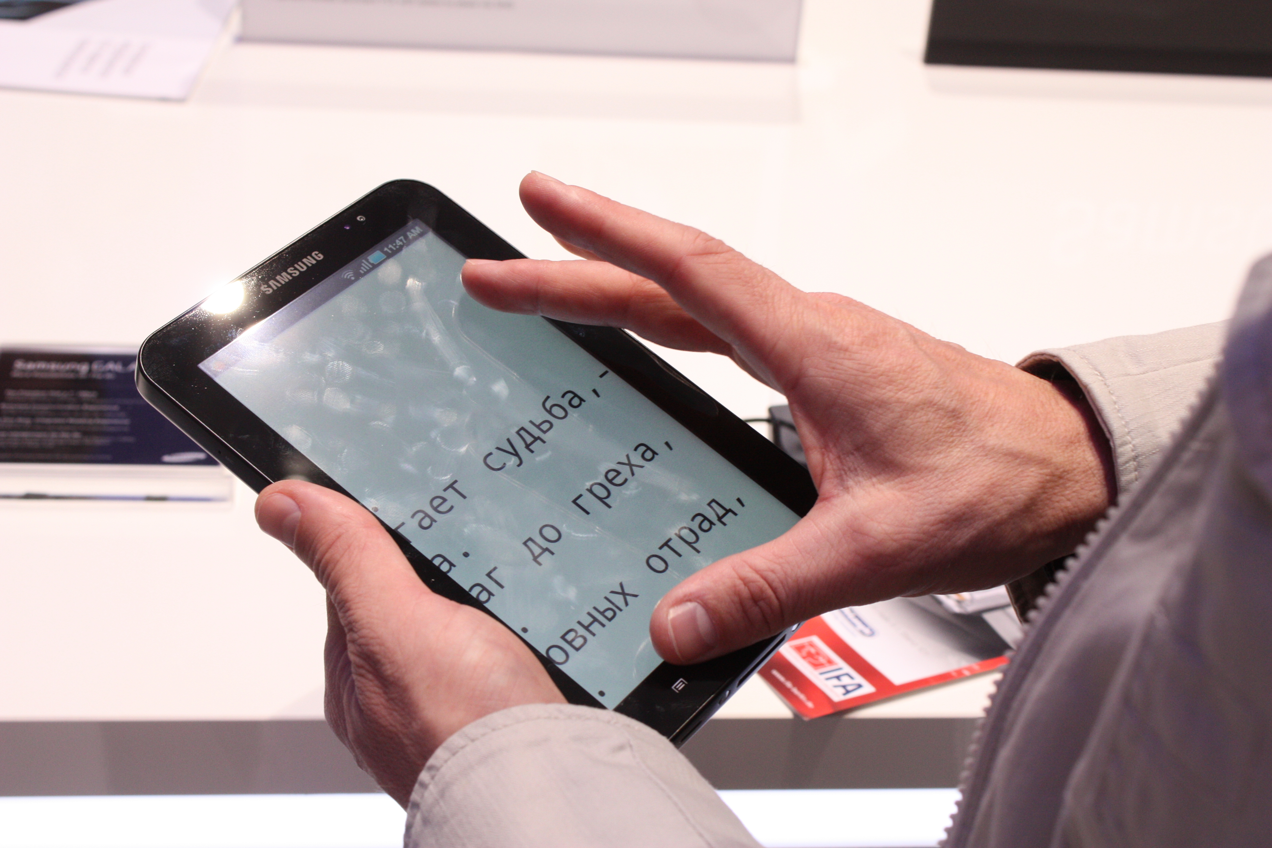 IFA 2010, Berlin